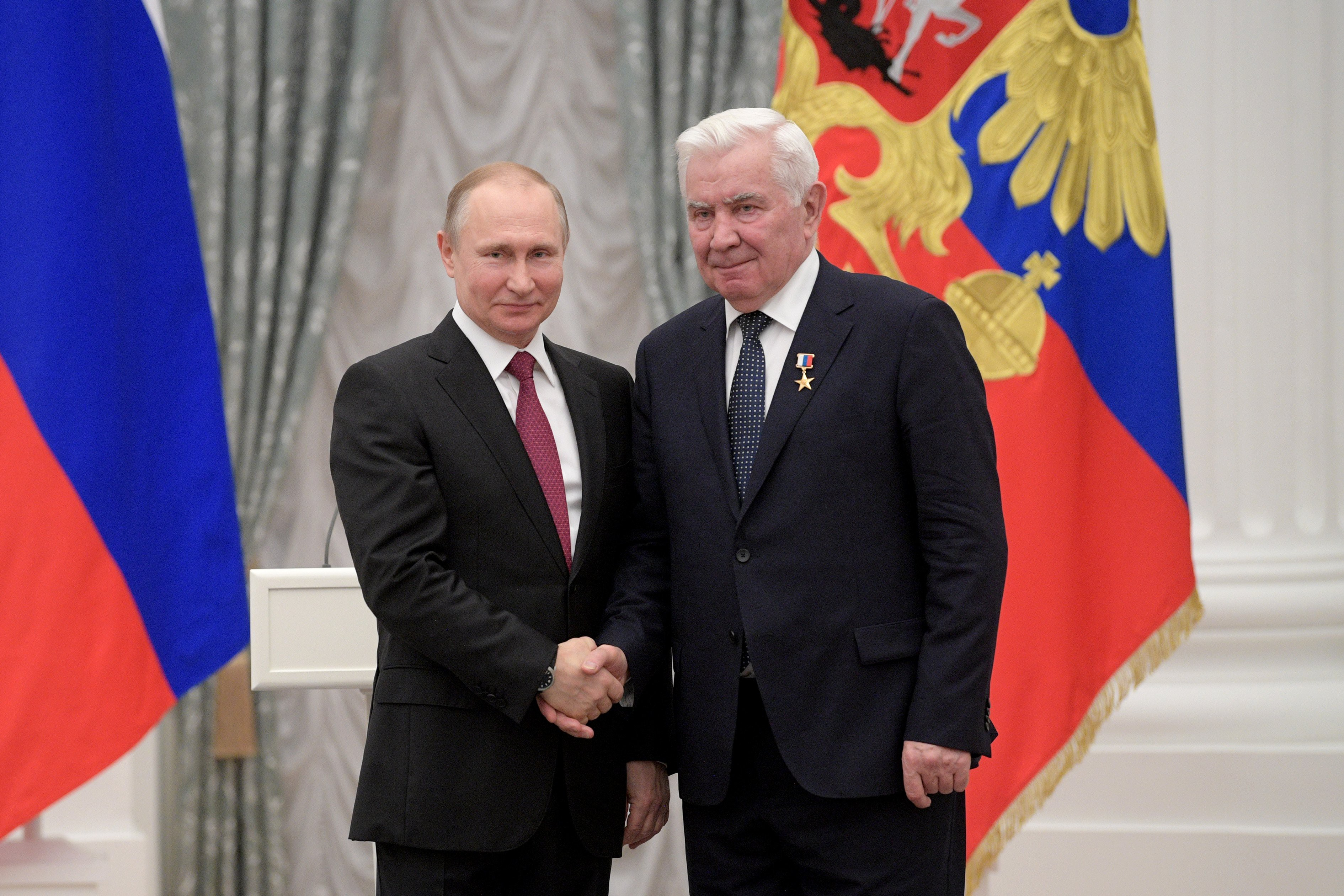 На церемонии награждения медалями «Герой Труда Российской Федерации». С главным тренером волейбольного клуба «Уралочка» Николаем Карполем